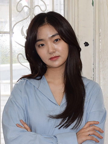 배우 김혜준. 2019년